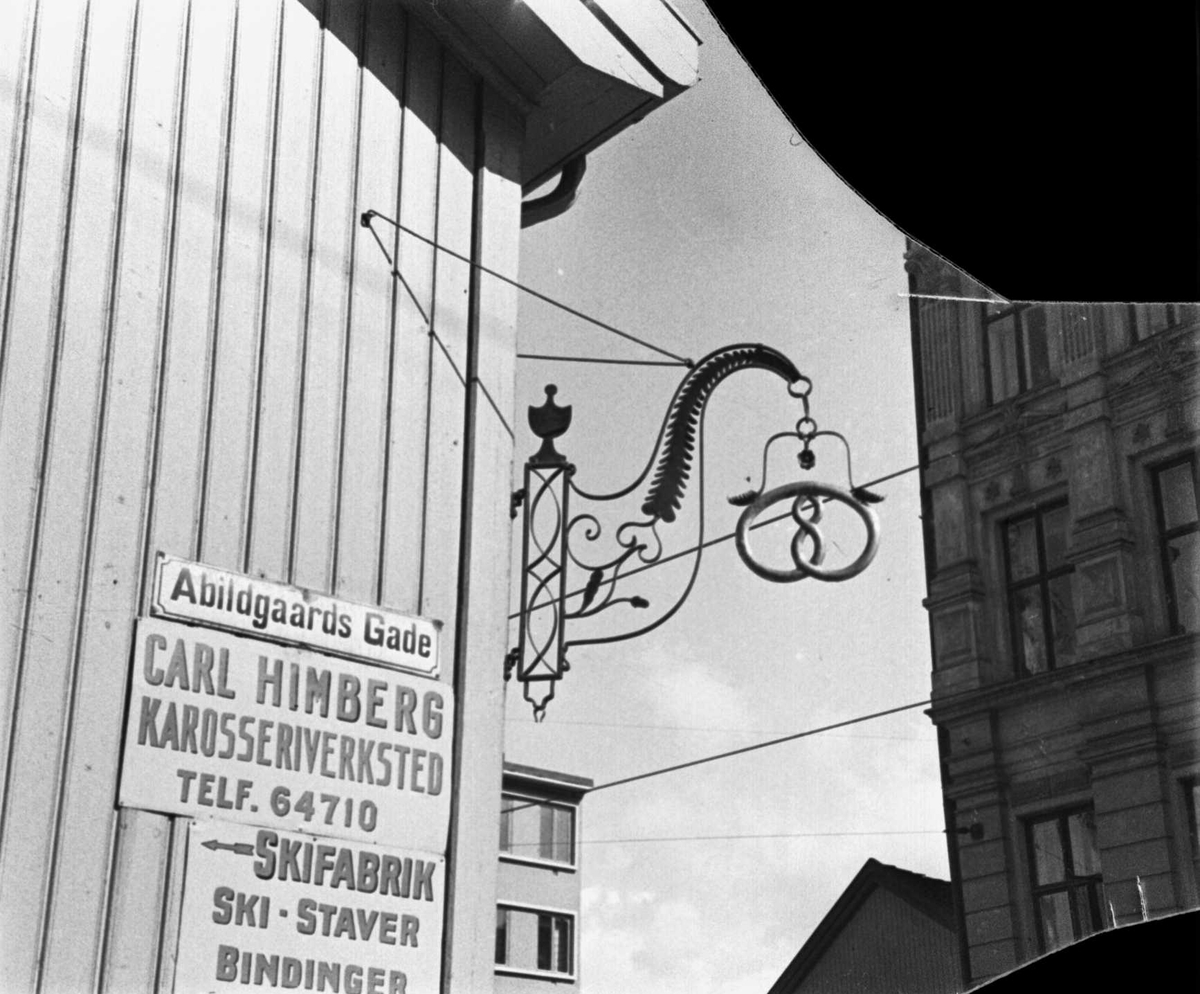 Abildgaards gate gikk sørvestover fra Bogstadveien ved Baker Bruns utsalg i nr. 30. Ukjent fotograf (1938), fra Byhistorisk samling hos Oslo Museum.